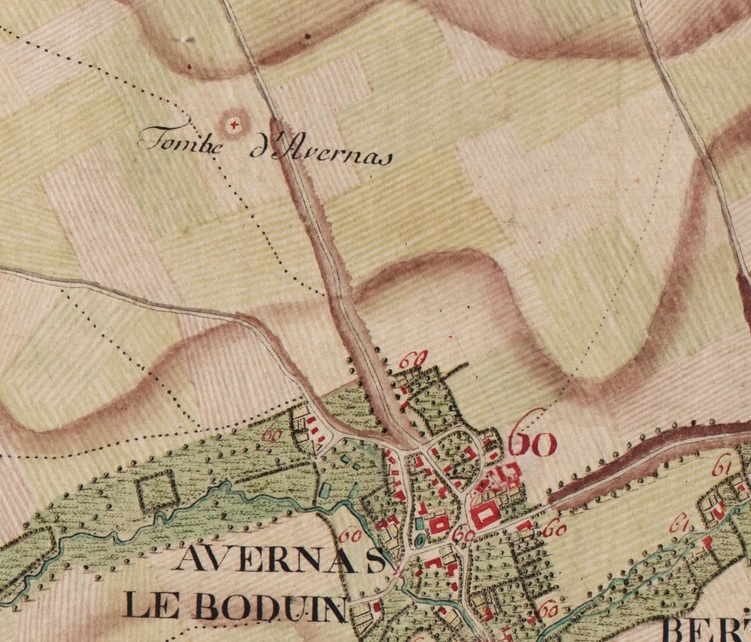 Extrait de la carte de Ferraris n° 133B